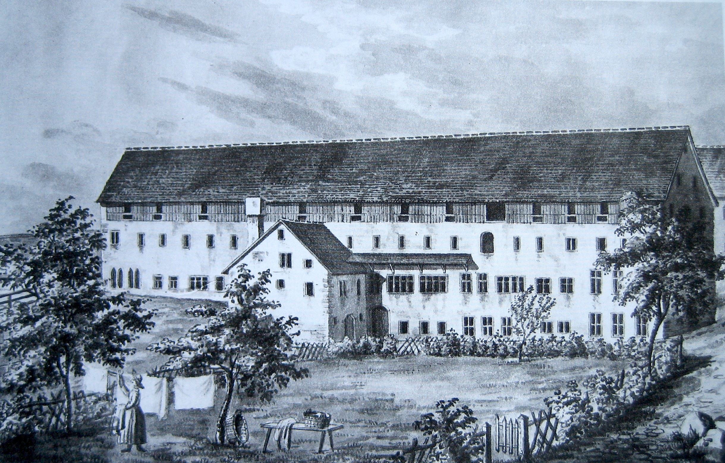 Längstrakt (Konventshaus) des Barfüsserklosters in Zürich. Nach der Reformation Amtshaus, Zeichnung von Emil Schulthess, um 1830